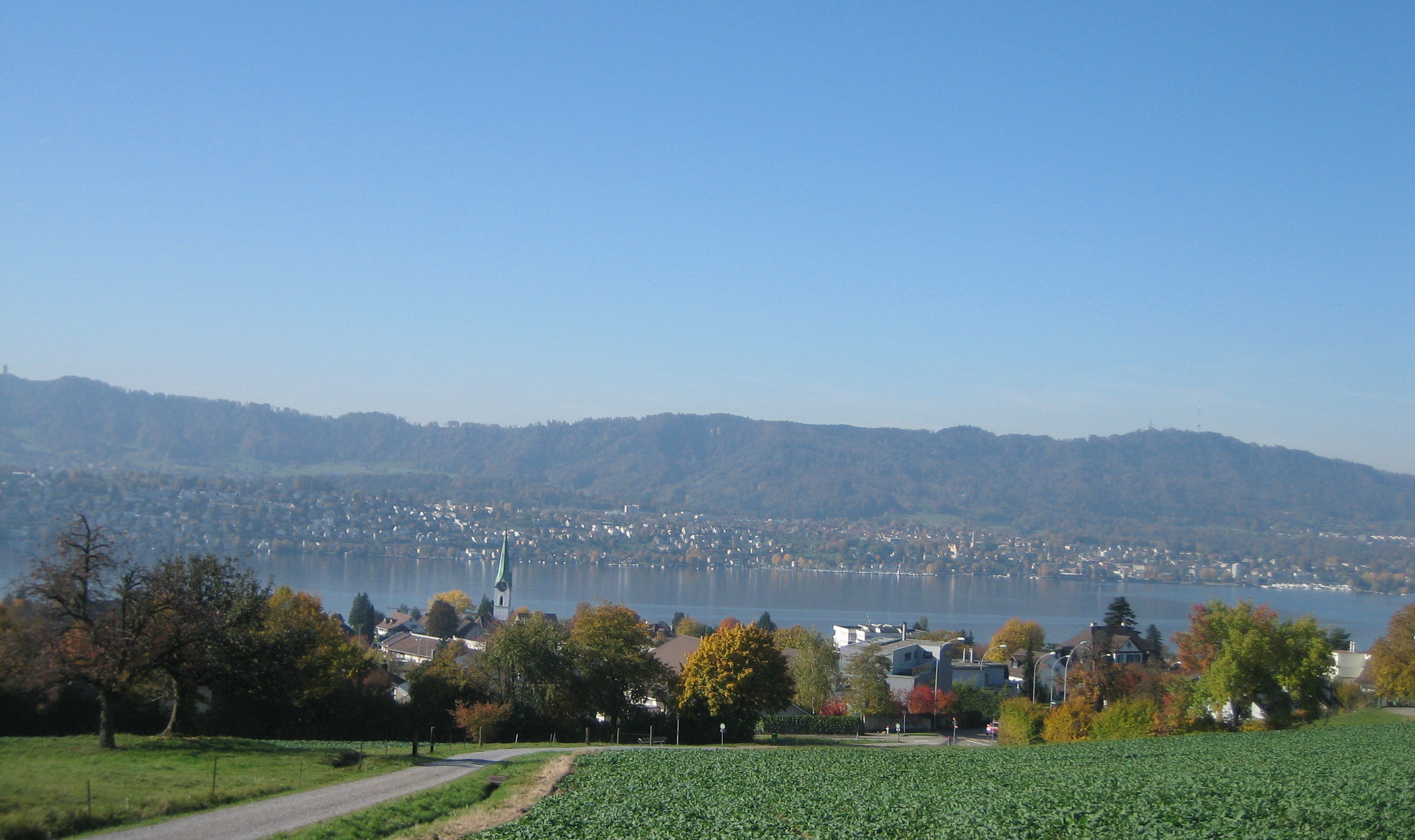 Blick über Zollikon zum Uetliberg